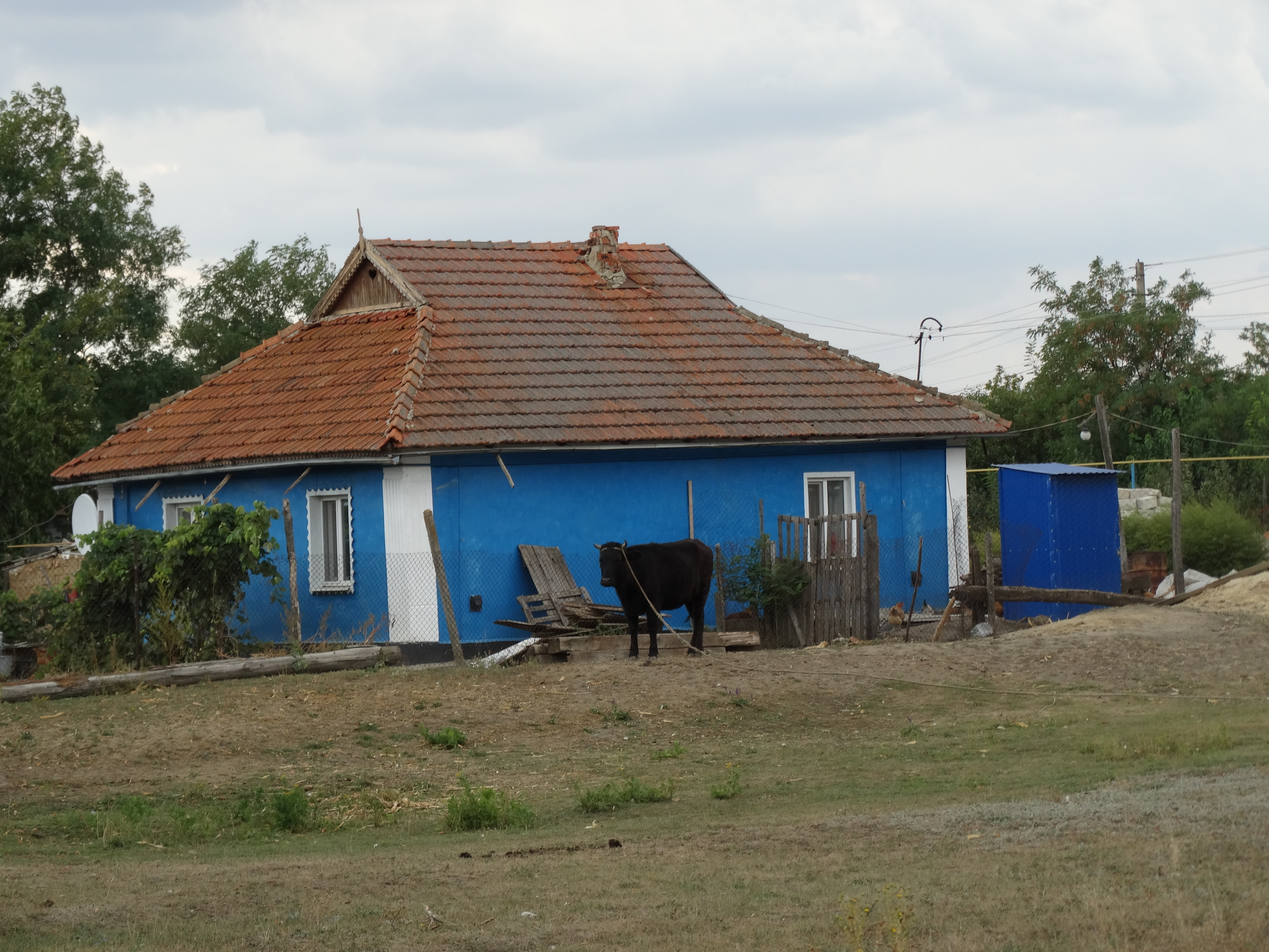 Будинок у селі Марківка, Роздільнянський район, Одеська область. Вікіекспедиція на Північ Одещини